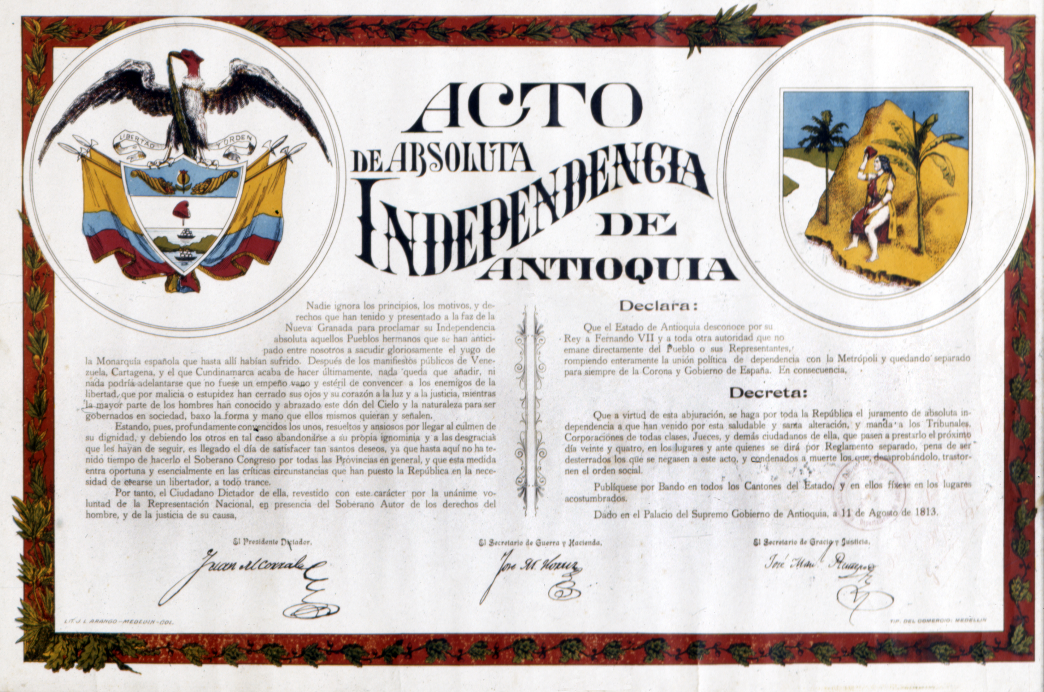 Déclaration d'indépendance absolue d'Antioquia, 11 août 1813